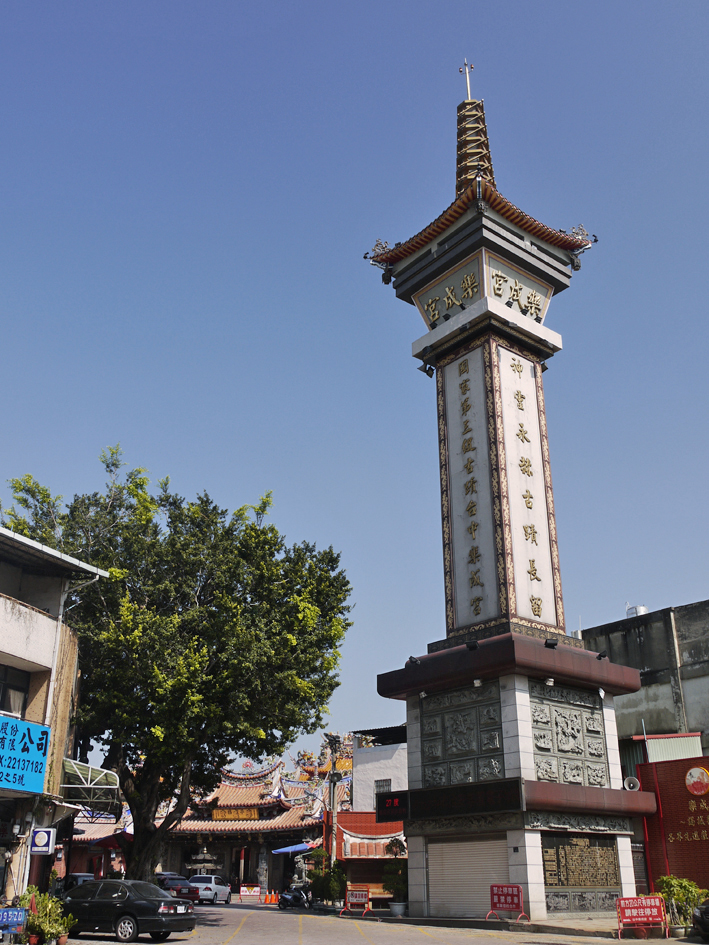 中文（台灣）: 樂成宮塔柱